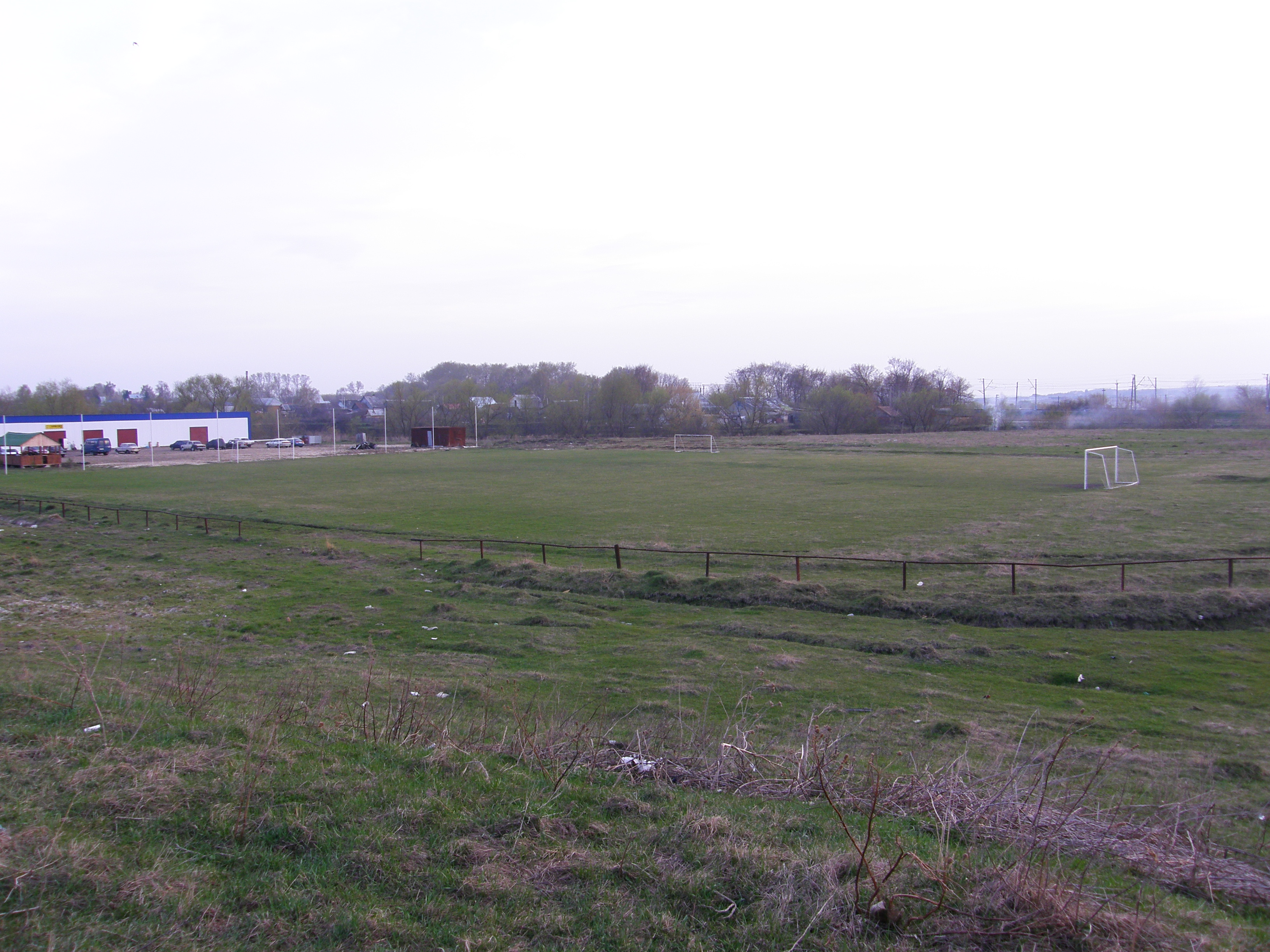 Футбольное поле в Большой Елховке